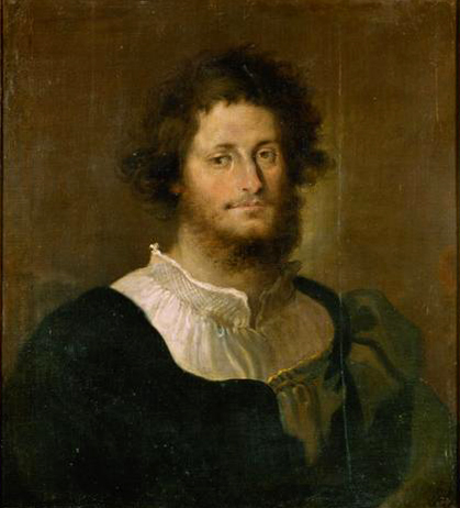 Federico II. di Francesco II. Gonzaga di Mantova